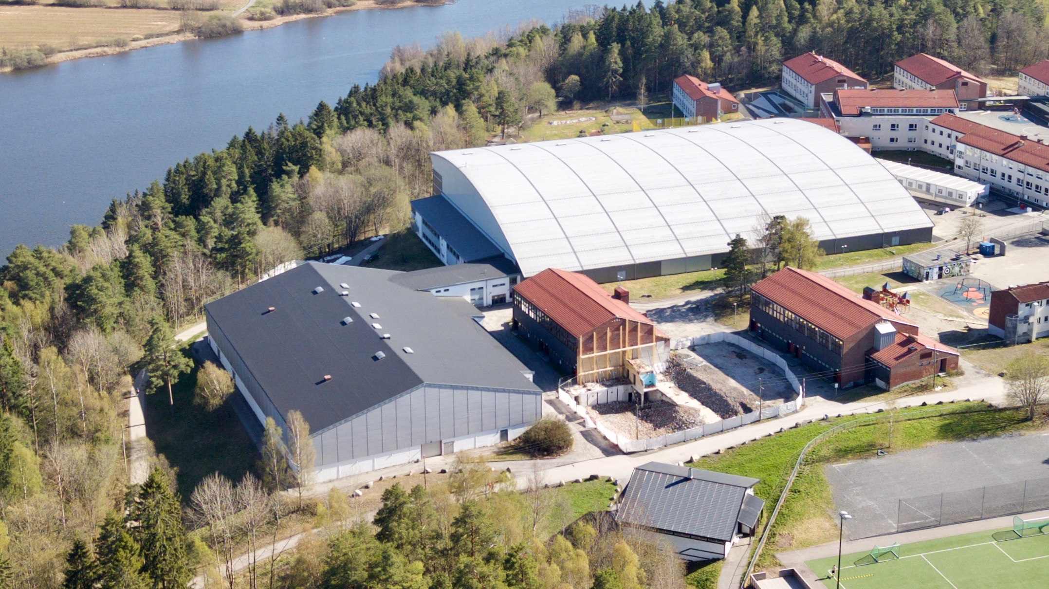 Manglerudhallen i Oslo.